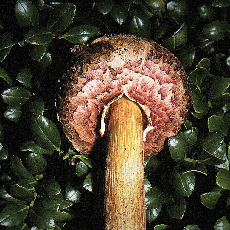 Boletellus emodensis, Bolet chrysanthème (キクバナイグチ), Strobilomyces annamite